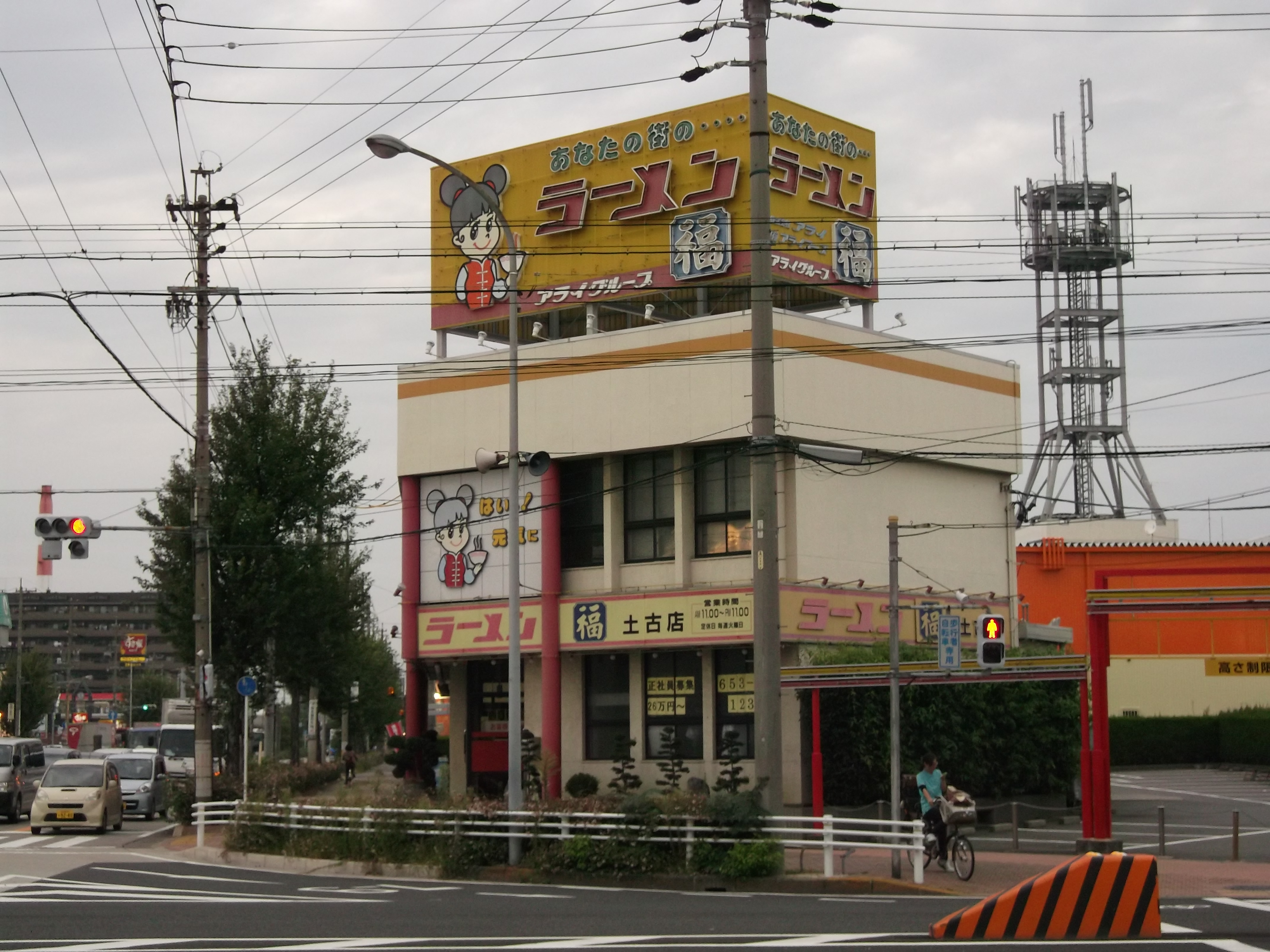 名古屋市港区川西通のラーメン福本社および土古店を南側公道より撮影